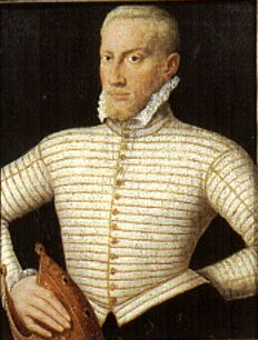 Portrait of Gebhard Truchsess von Waldburg (1547-1601)